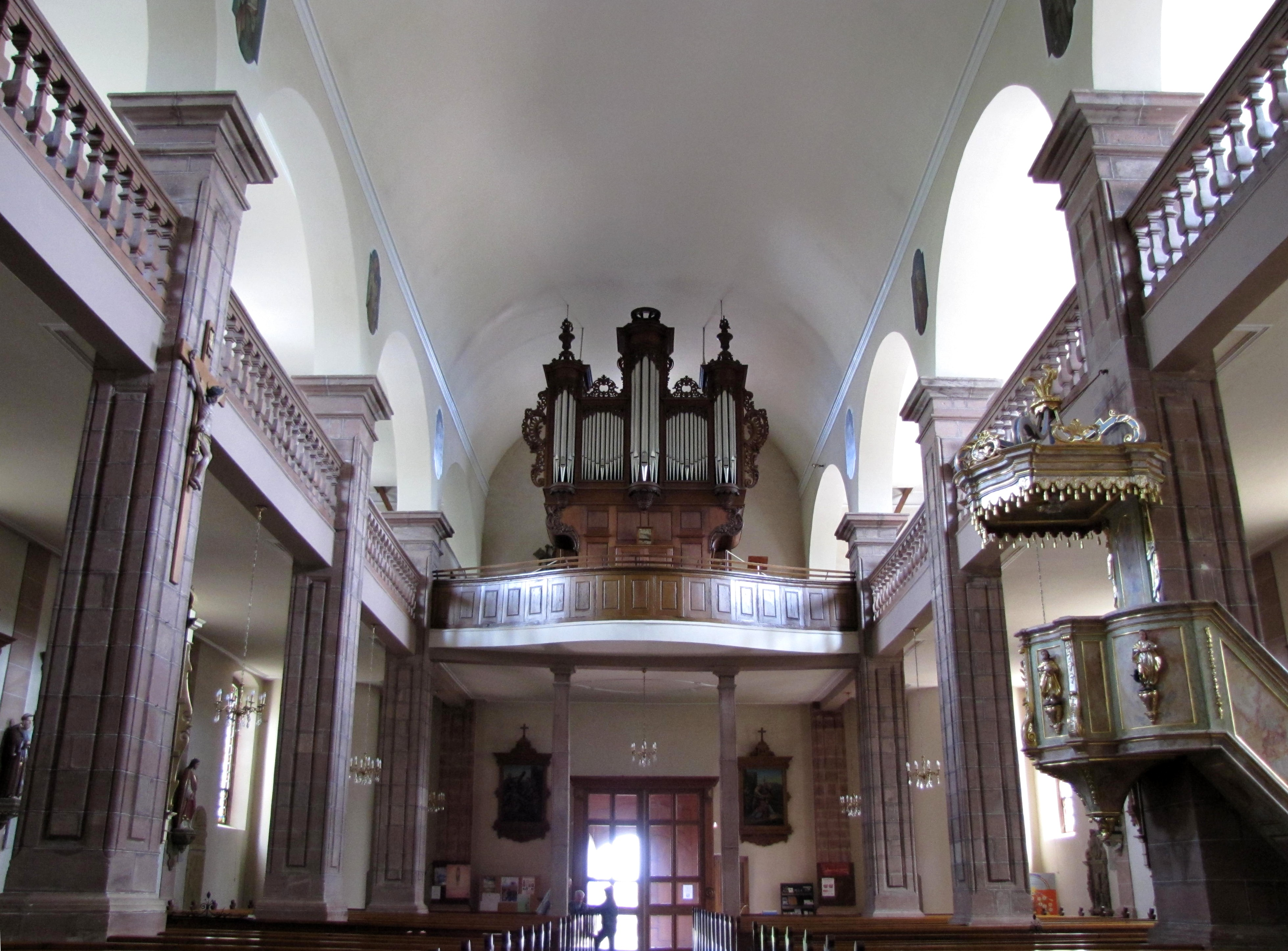 Alsace, Bas-Rhin, Église Saint-Georges de Châtenois (PA00084665, IA00124434).Vue intérieure de la nef vers la tribune d'orgue.